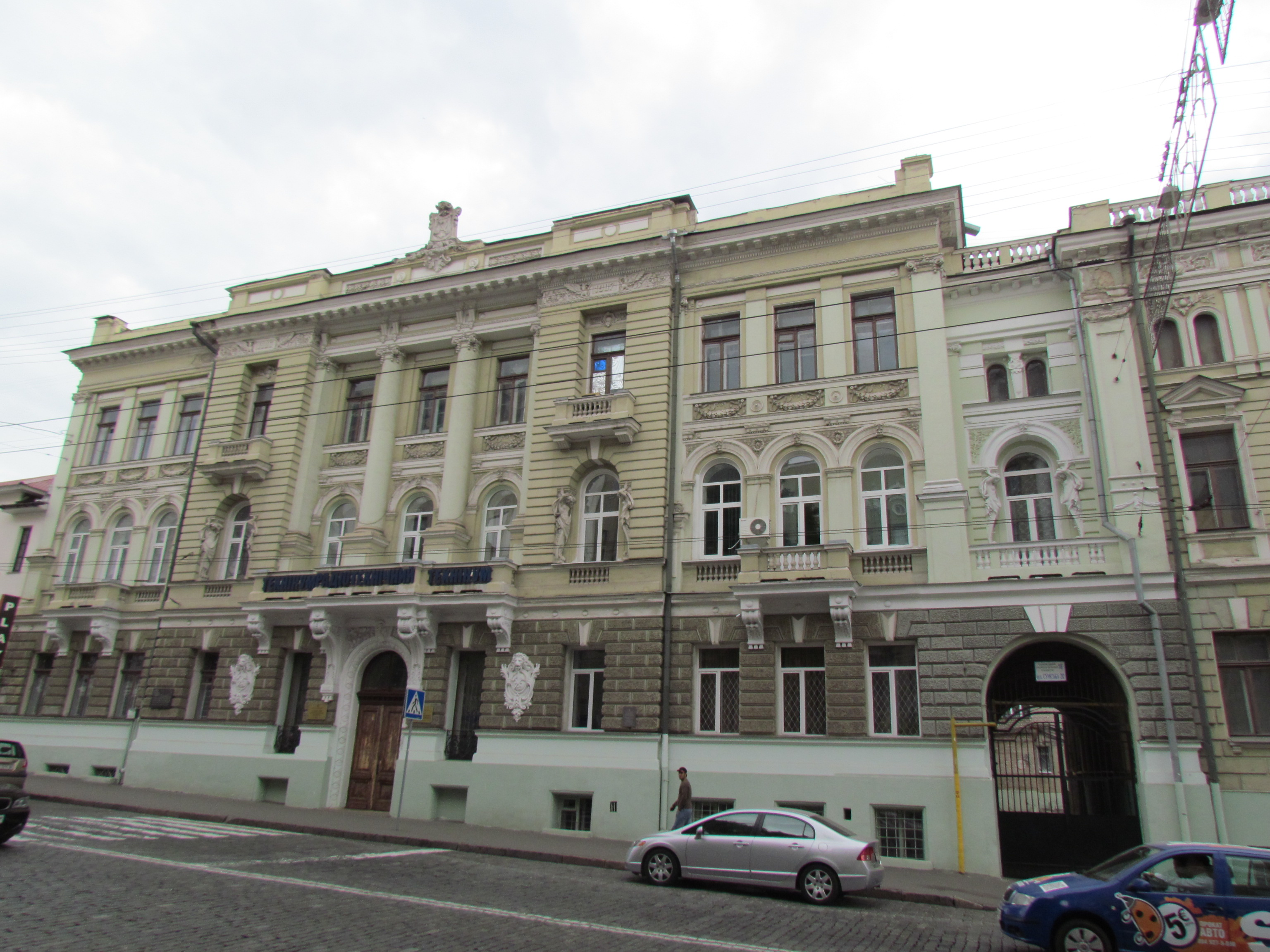 Україна, Харків, вул. Сумська, 18-20